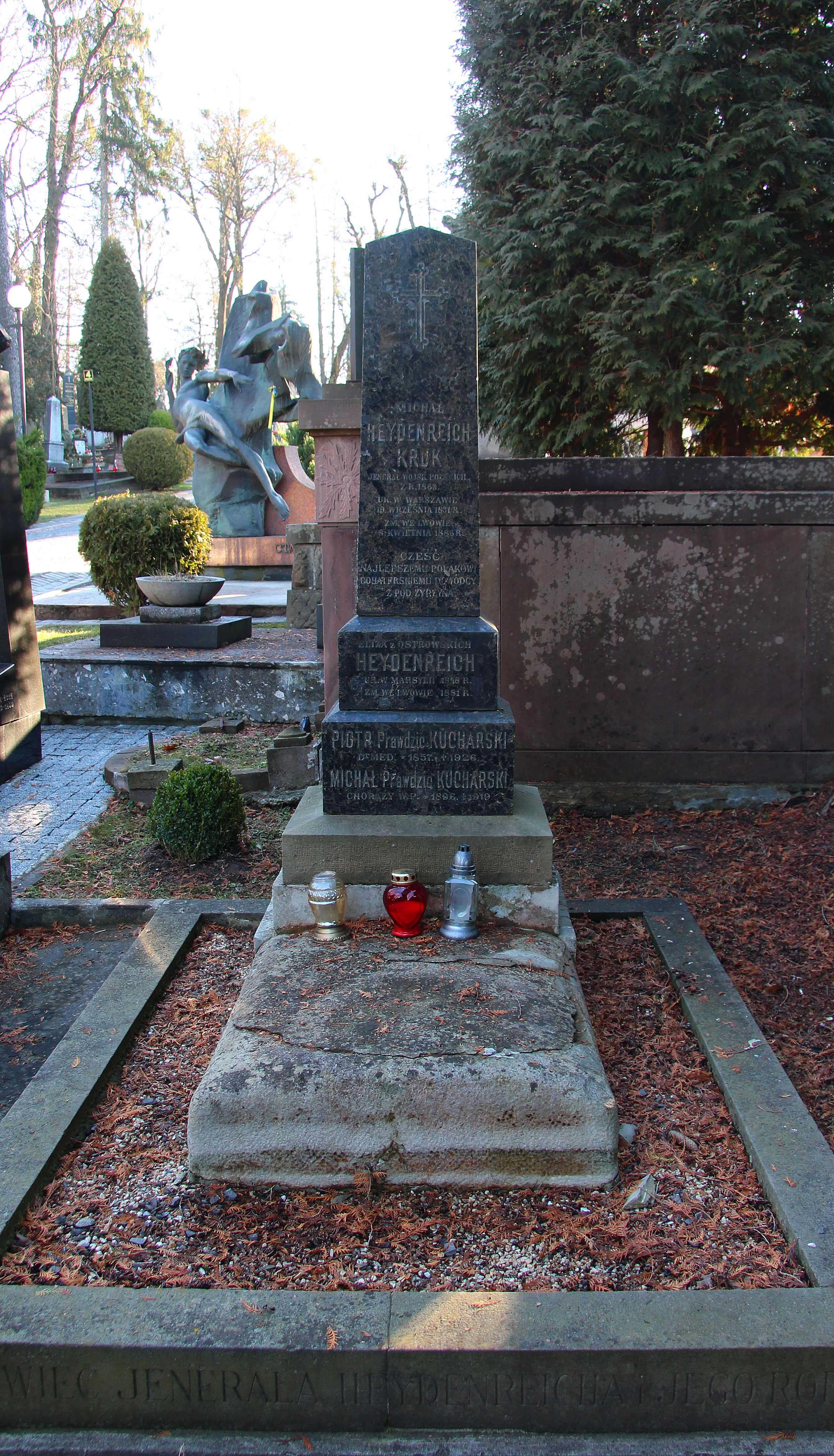 Пам'ятник на могилі Міхала-Яна Гейденрейха.Личаківський цвинтар ,поле №3.